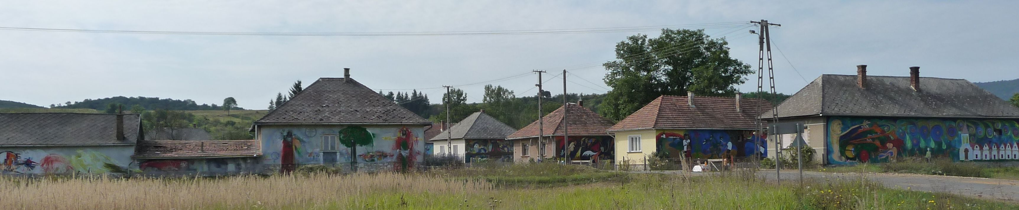 Bódvalenke — a freskófalu Hídvégardó felől.